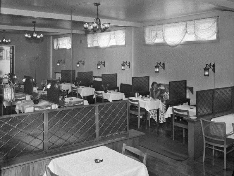 Krølle restaurant, interiør, kvinner2.